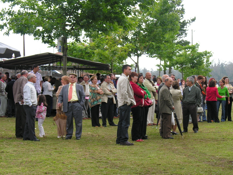 Festas do 1 de xullo de 2007 en Vilarromarís, Oroso, Galicia